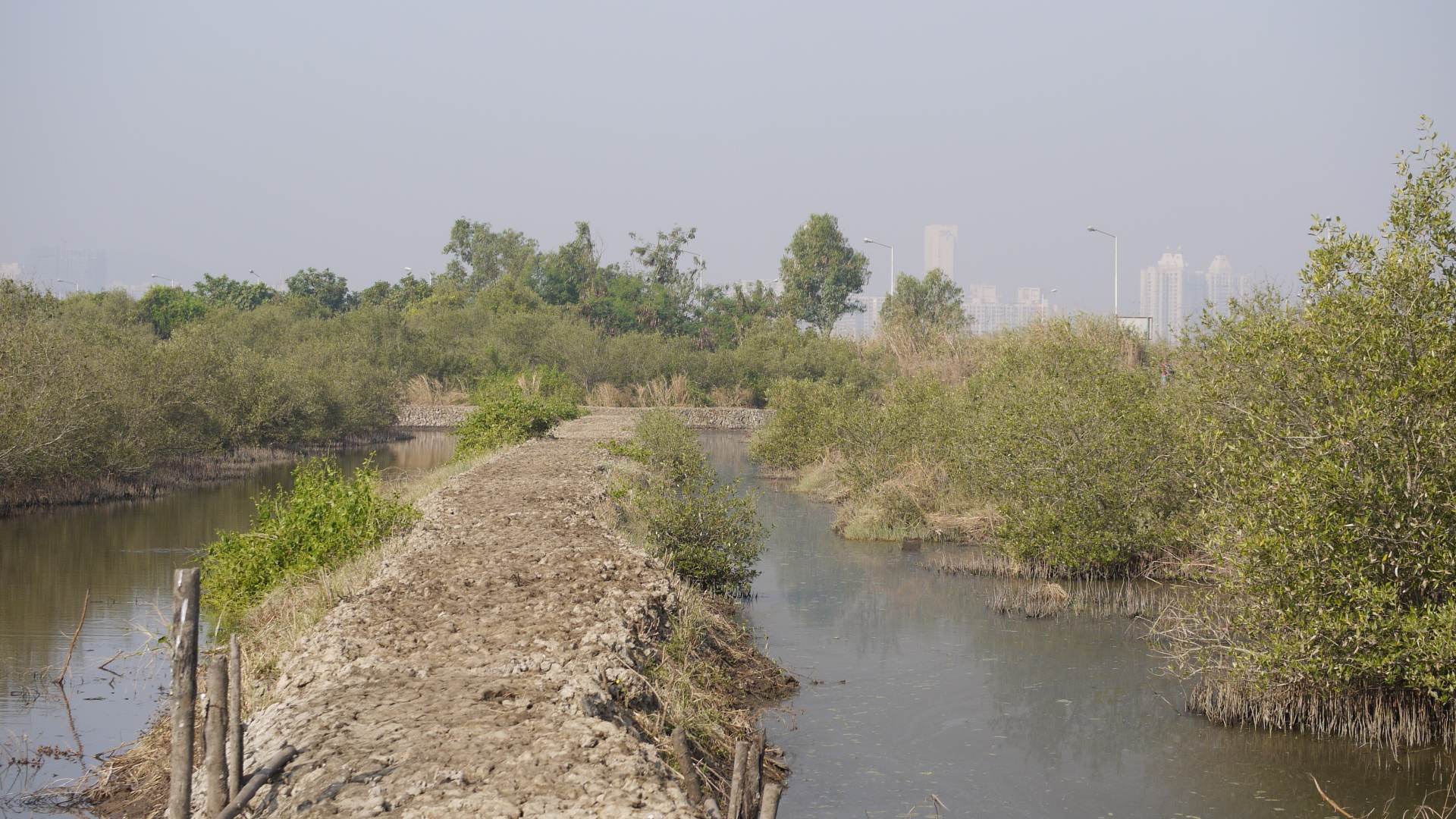 ... near Bhandup Pumping Station